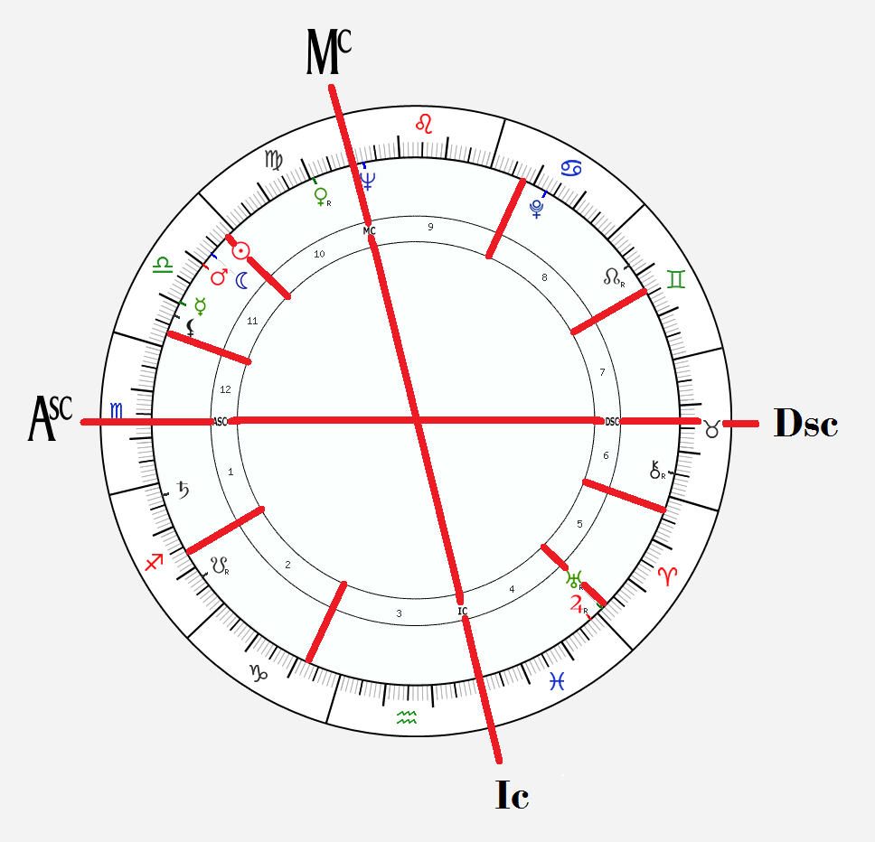 Esempio di domificazione nel tema natale dell'allenatore di calcio Enzo Bearzot, con evidenziata l'intersezione tra l'asse dell'Ascendente con quella del Medium Coeli.